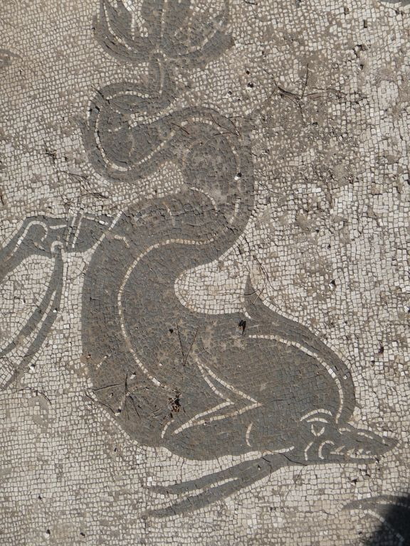 Mosaico degli scavi di Ostia Antica